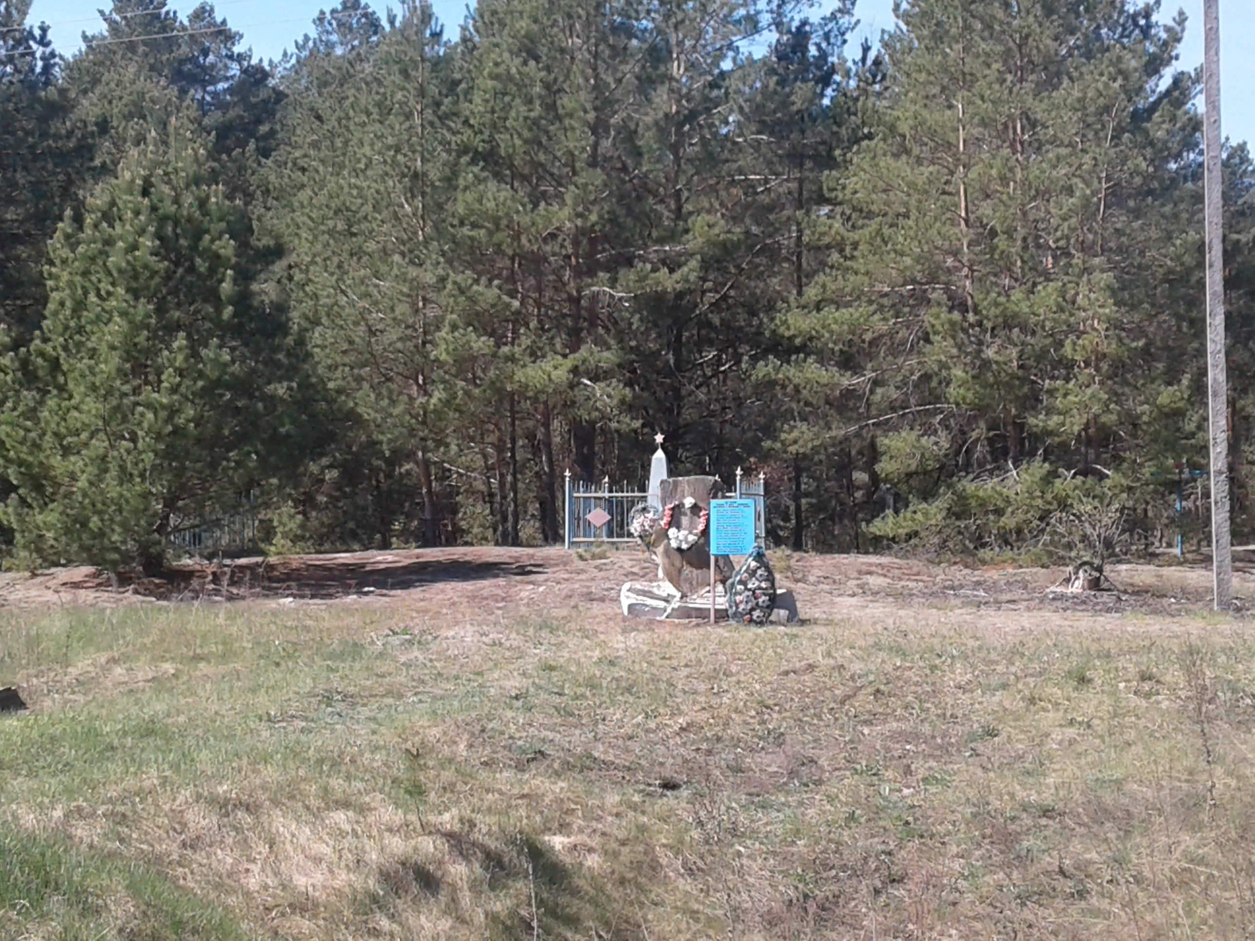 пам'ятний знак загиблим мешканцям хутора Каплиця